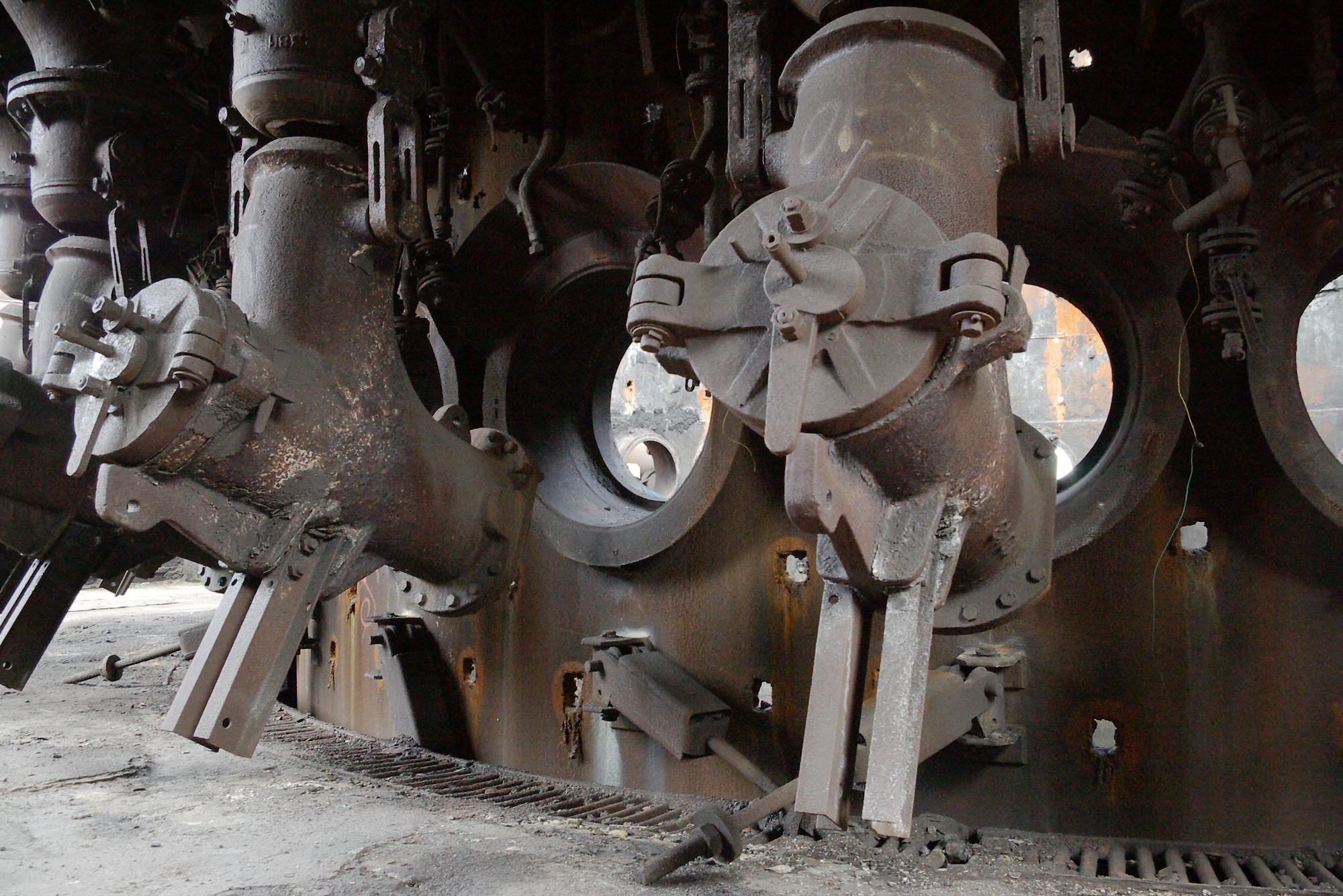 Stillgelegtes Hoesch Werk Phoenix West, Dortmund. Windöffnungen am teildemontierten östlichen Hochofen.